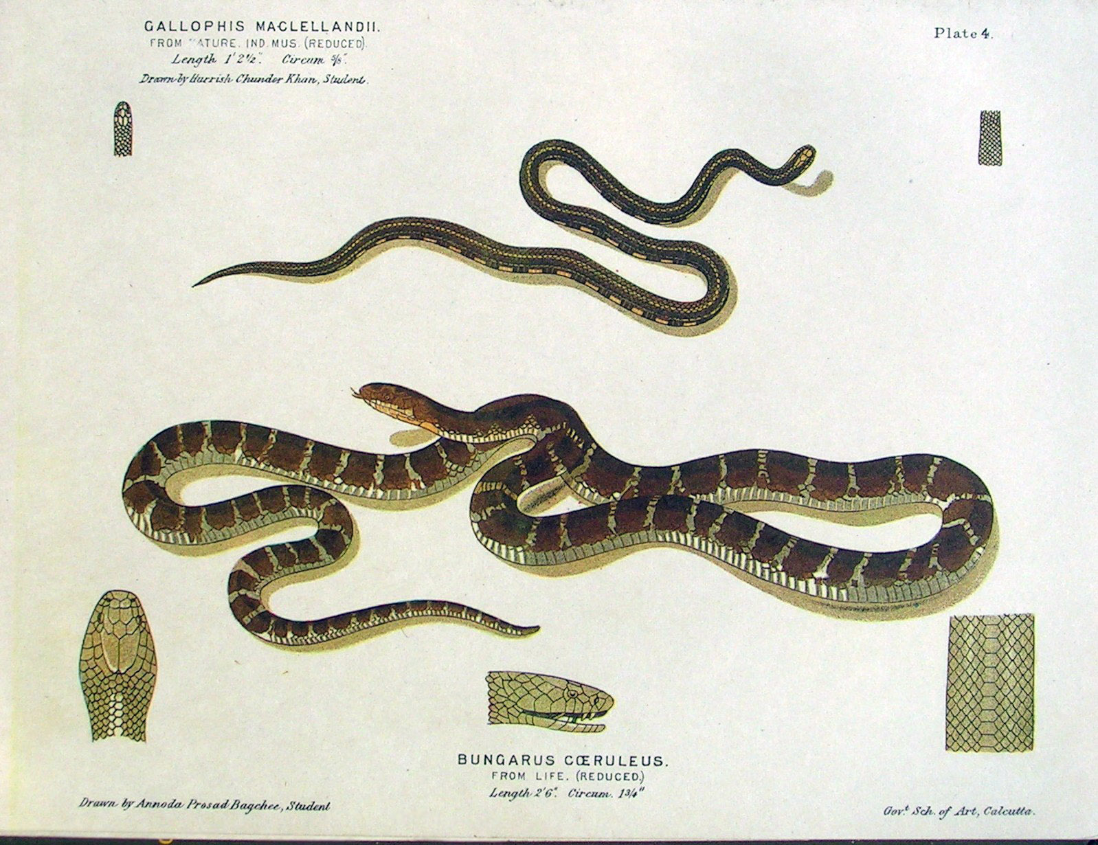 Bungarus caeruleus, Common Krait illustration